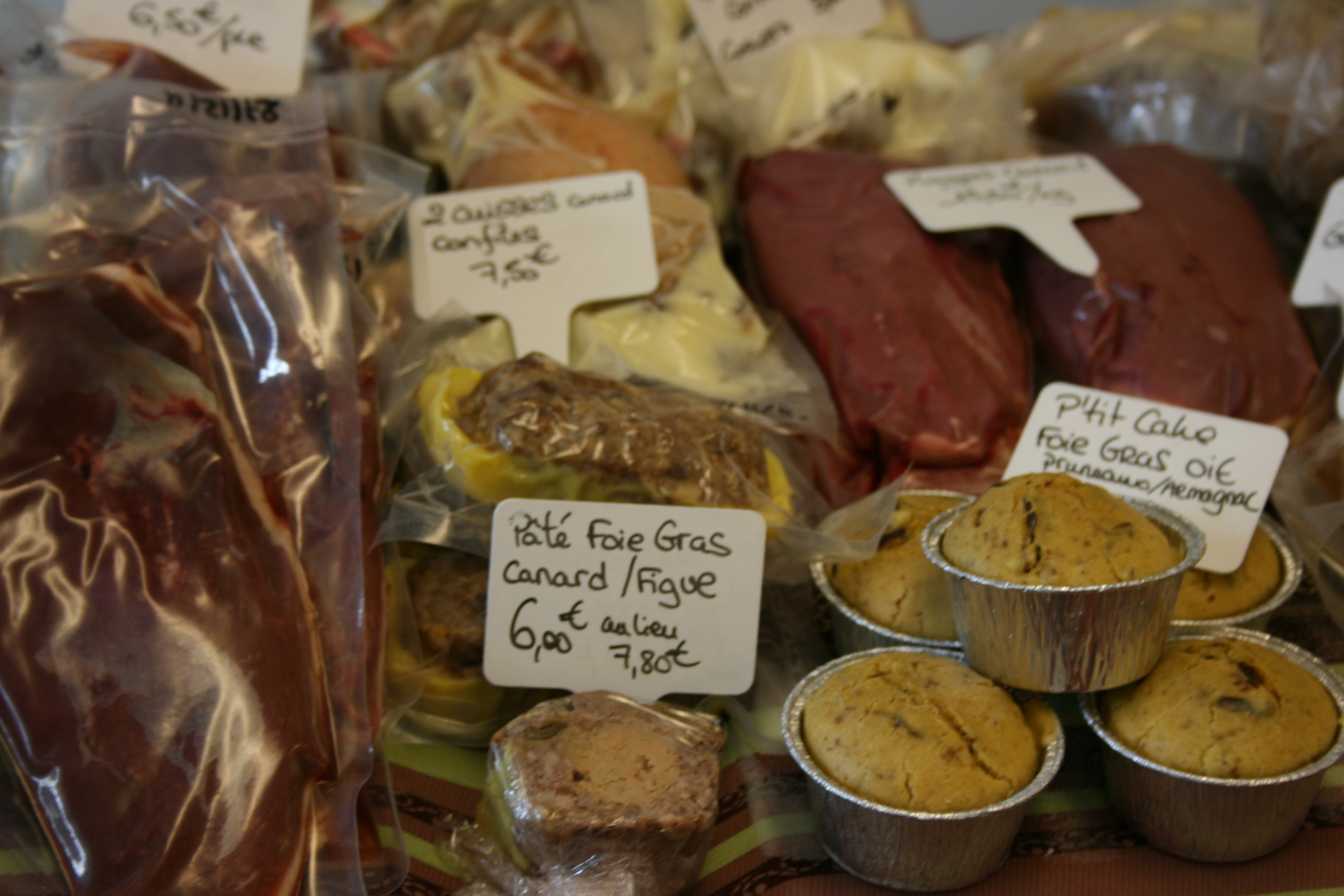 Spécialités vendues au Marché primé au gras de la ville de Saint Yrieix